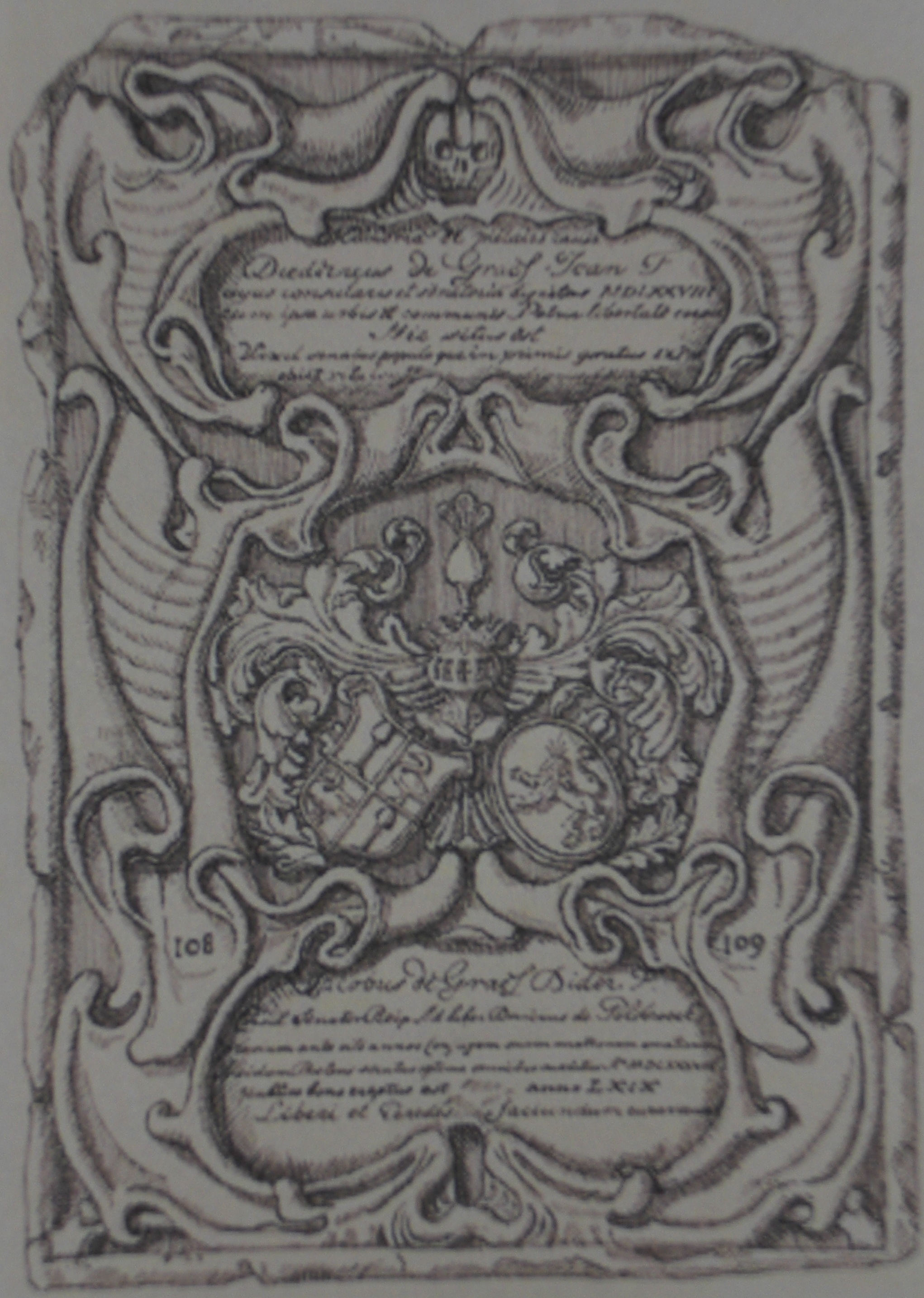 Grafzerk van Diederik Jansz Graeff (1529-1589) in het Amsterdamse Oude kerk